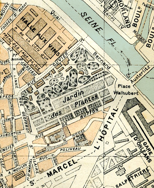 Le Muséum national d'Histoire naturelle de Paris en 1885, sur le plan de L. Guillemin